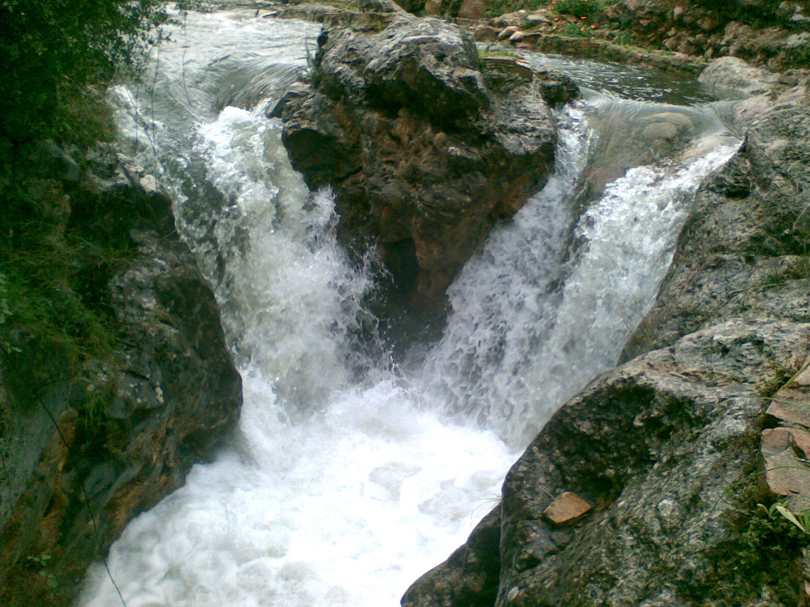 Salt d'aigua del riu Veo anomenat l'Engolidor